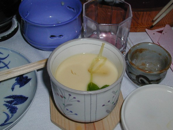 Chawan mushi Foto scattata nella casa di campagna di amici giapponesi ad Amelia il 5.1.03 Categoria:Immagini di cucina e alimenti